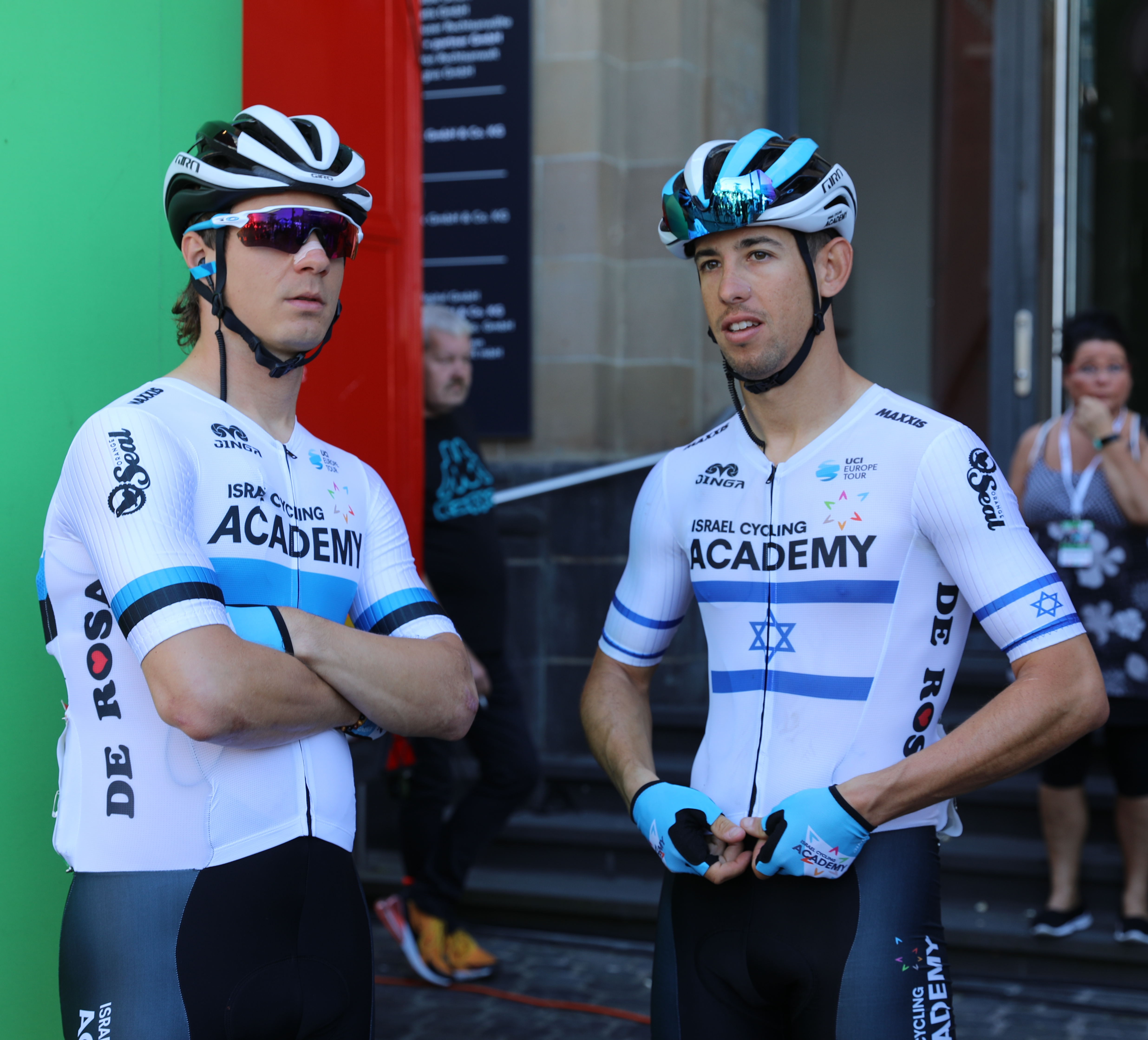 Mihkel Räim (l.), estnischer Radrennfahrer, Roy Goldstein, israelischer Radrennfahrer